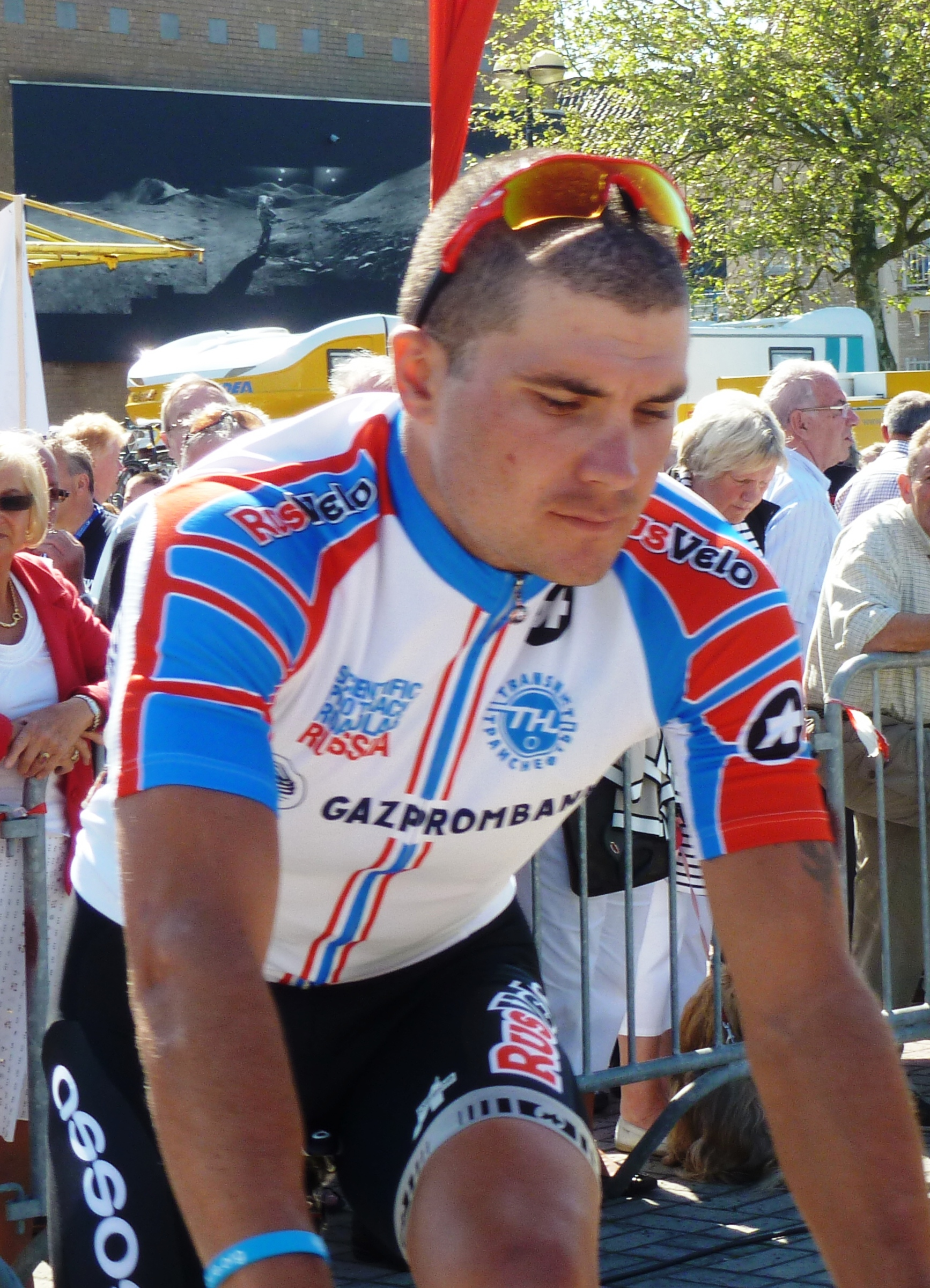 Waleri Wladimirowitsch Walynin, russischer Radrennfahrer, Belgien-Rundfahrt 2012